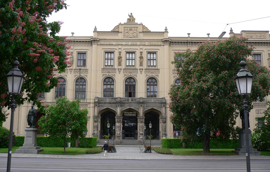 Völkerkundemuseum an der Maximilianstraße Photograph: Matthias Kern